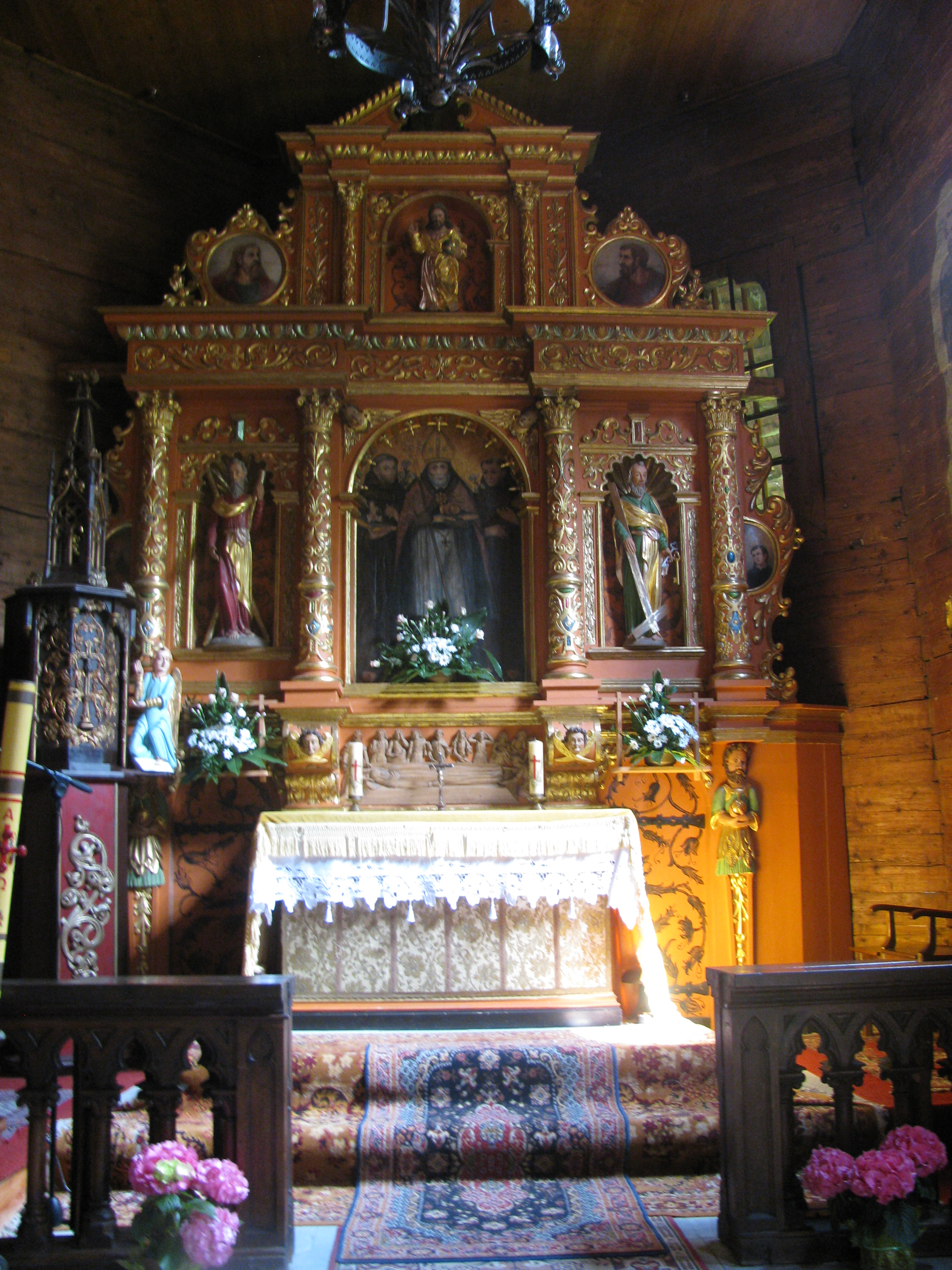 Ołtarz główny w zabytkowym kościele w Sękowej (zabytek nr rejestr. A-552)